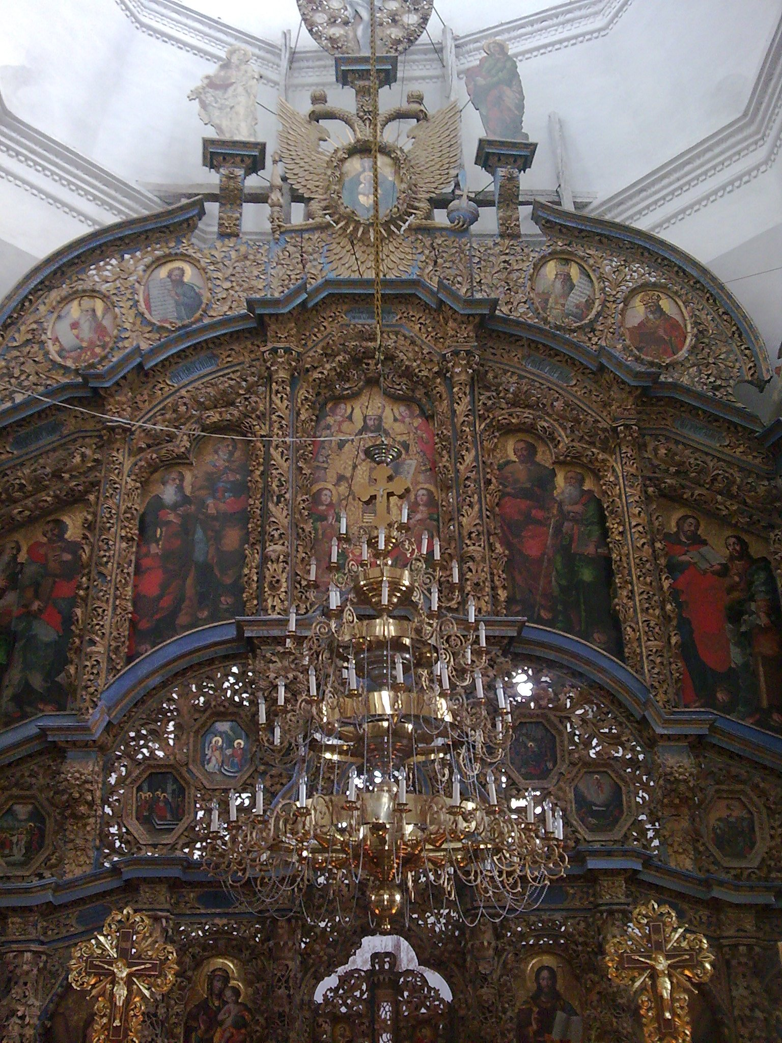 Всередині Великосорочинської Спасо-Преображенської церкви - іконостасу храму